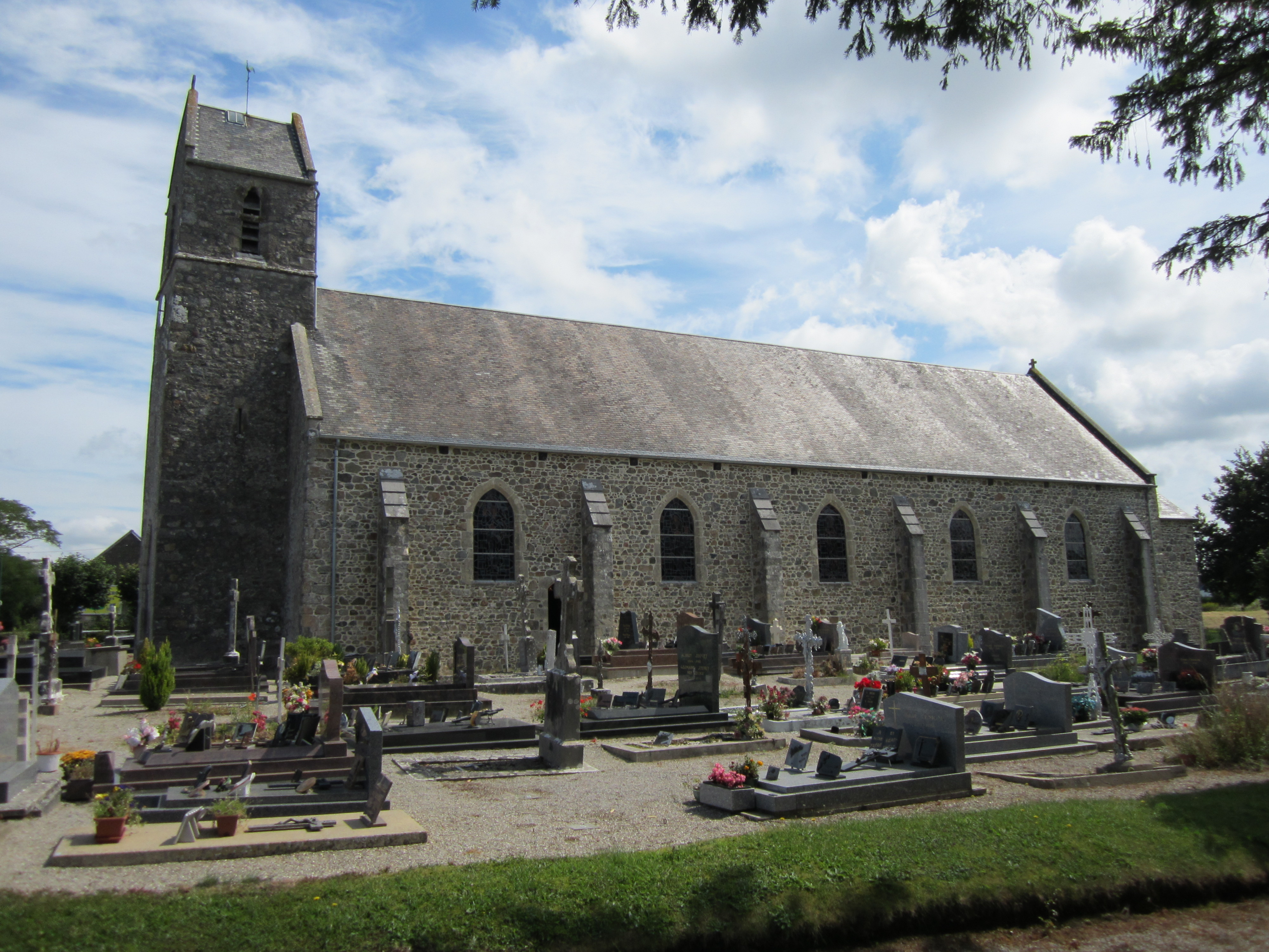 église Saint-Manvieu de Vaudrimesnil